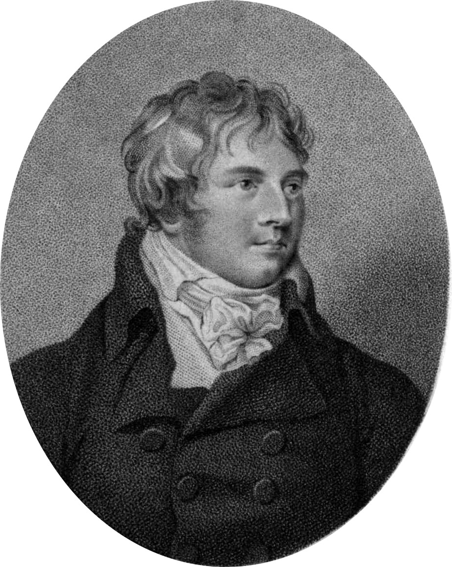 Depicted person: Jan Ladislav Dussek